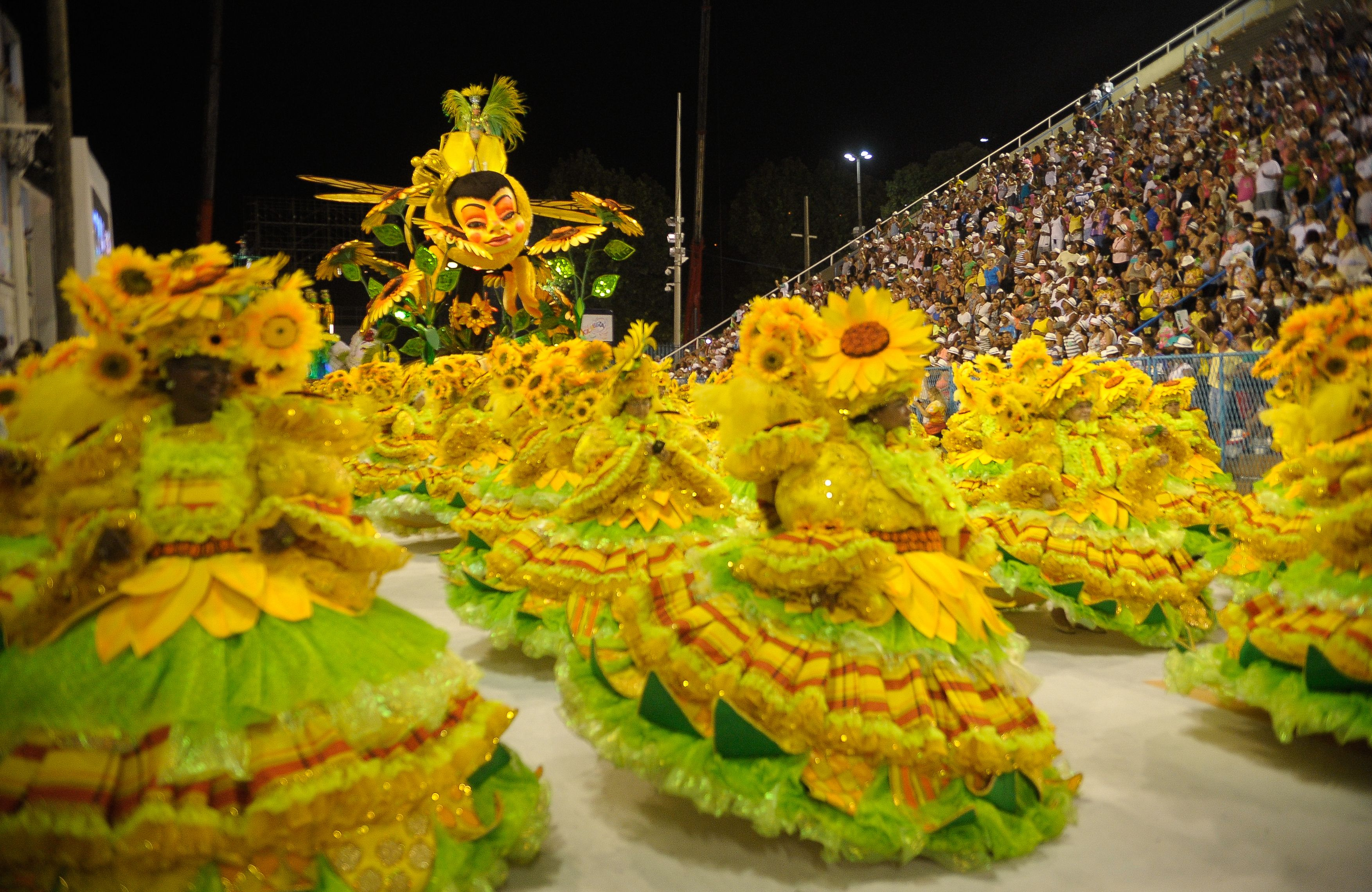 Imperatriz Leopoldinense abre o Desfile das Campeãs no Rio (Tomaz Silva/Agência Brasil)